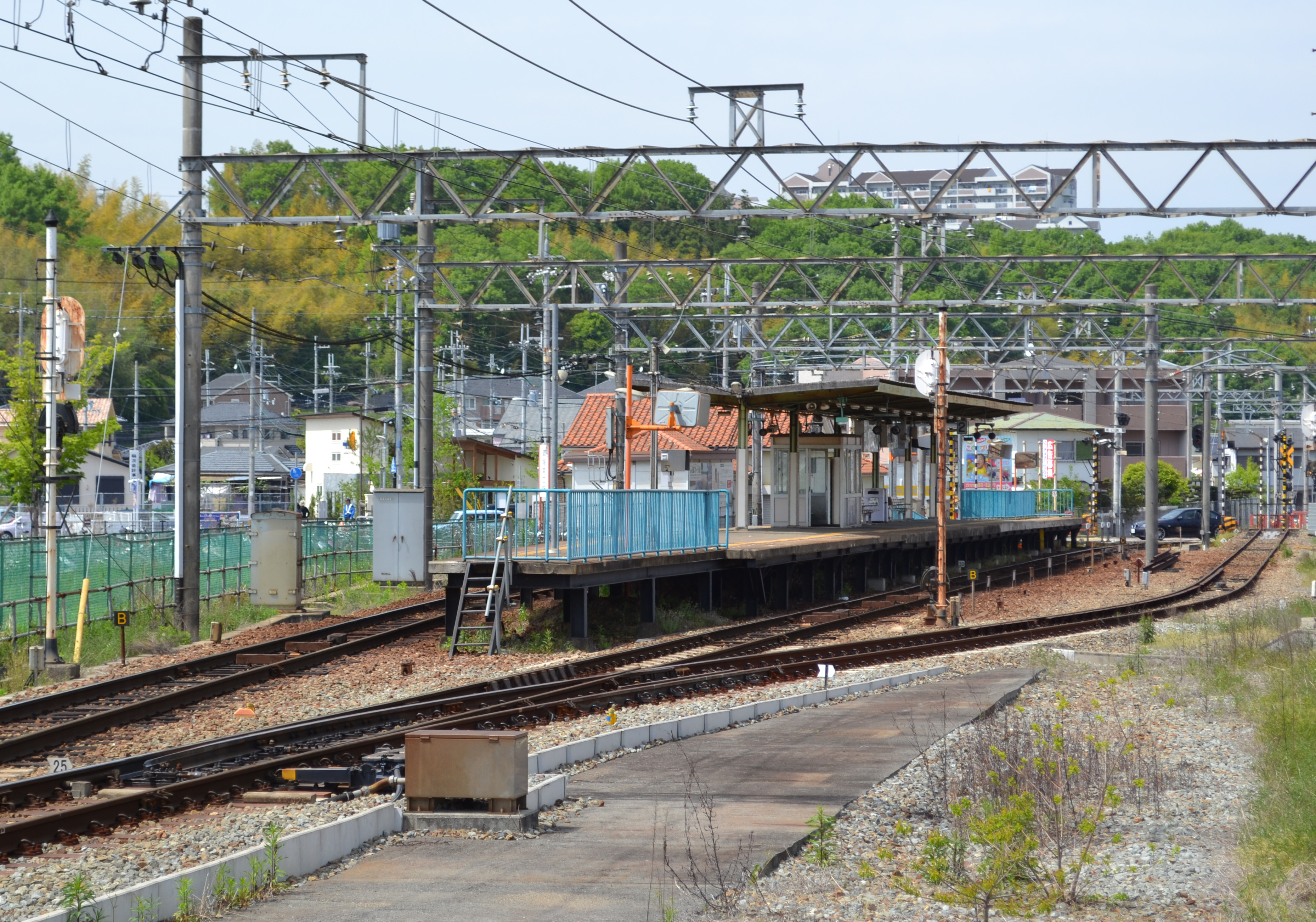 道場南口駅構内